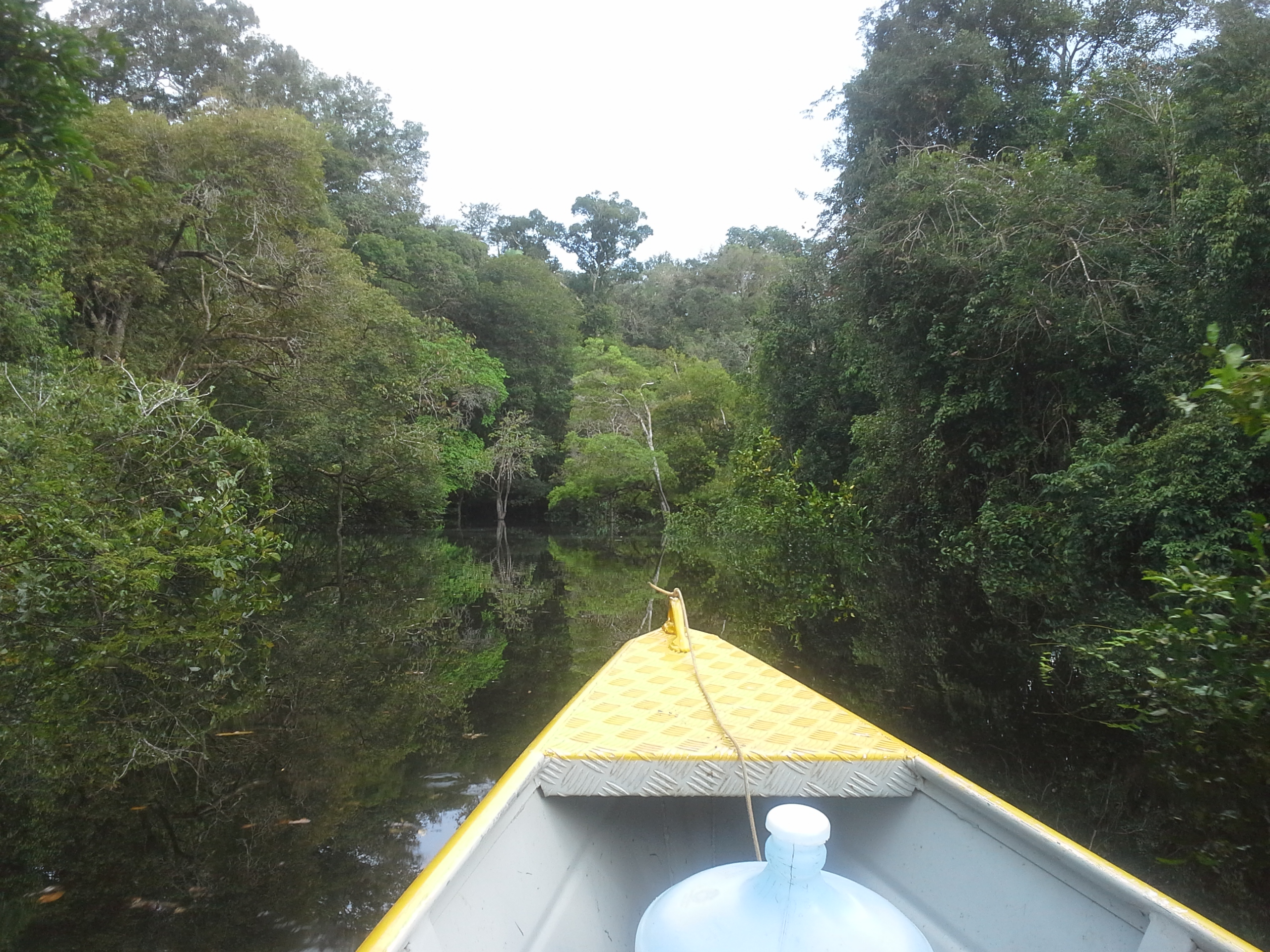 90 meters of water that flooded the forest